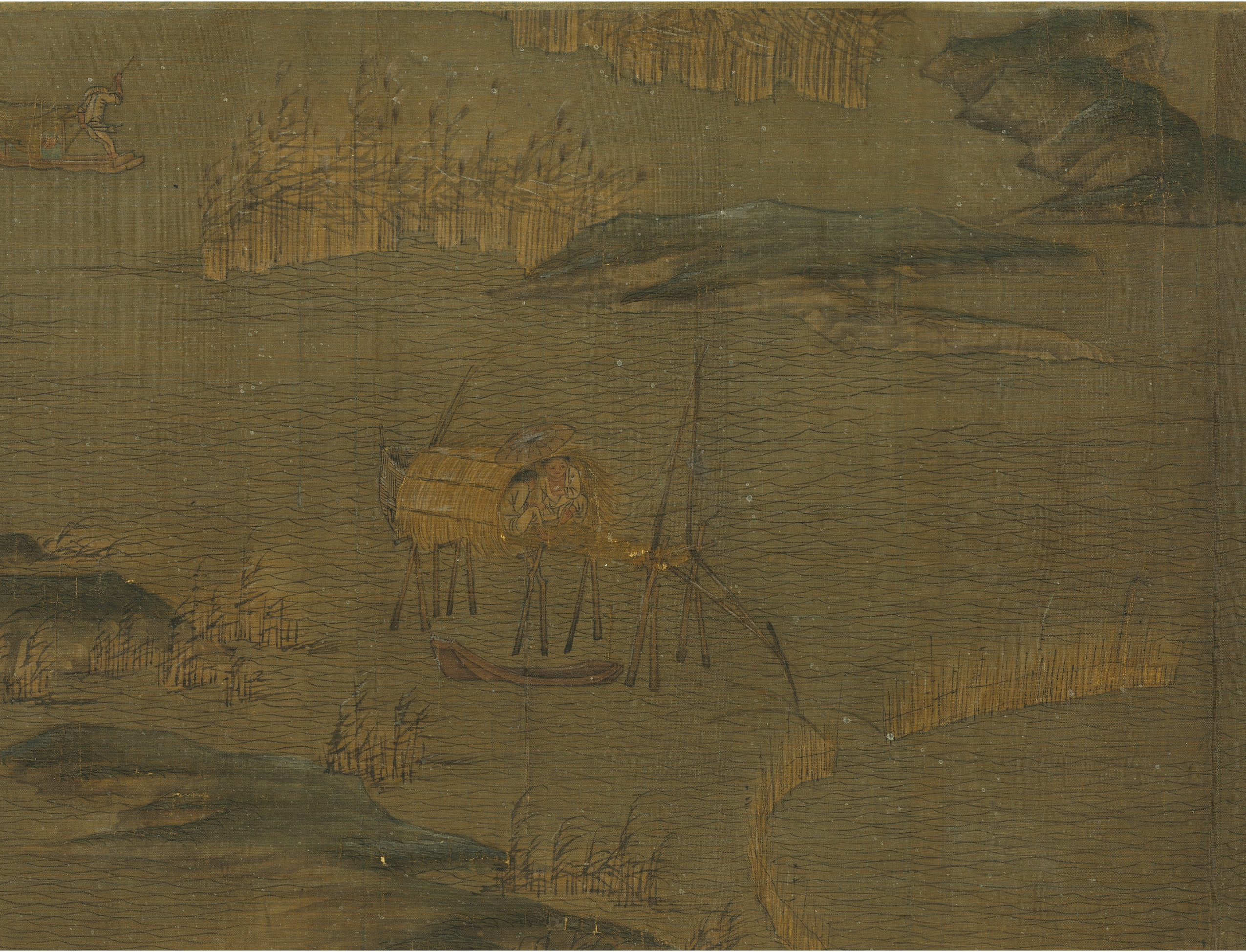 Voyage sur le fleuve à la première neige, section d'un rouleau horizontal. Encre et couleurs sur soie. (H. 25,9cm). Attribution à Zhao Gan, peintre chinois Xe siècle. Collections du Musée du palais. Taichung (Formose).